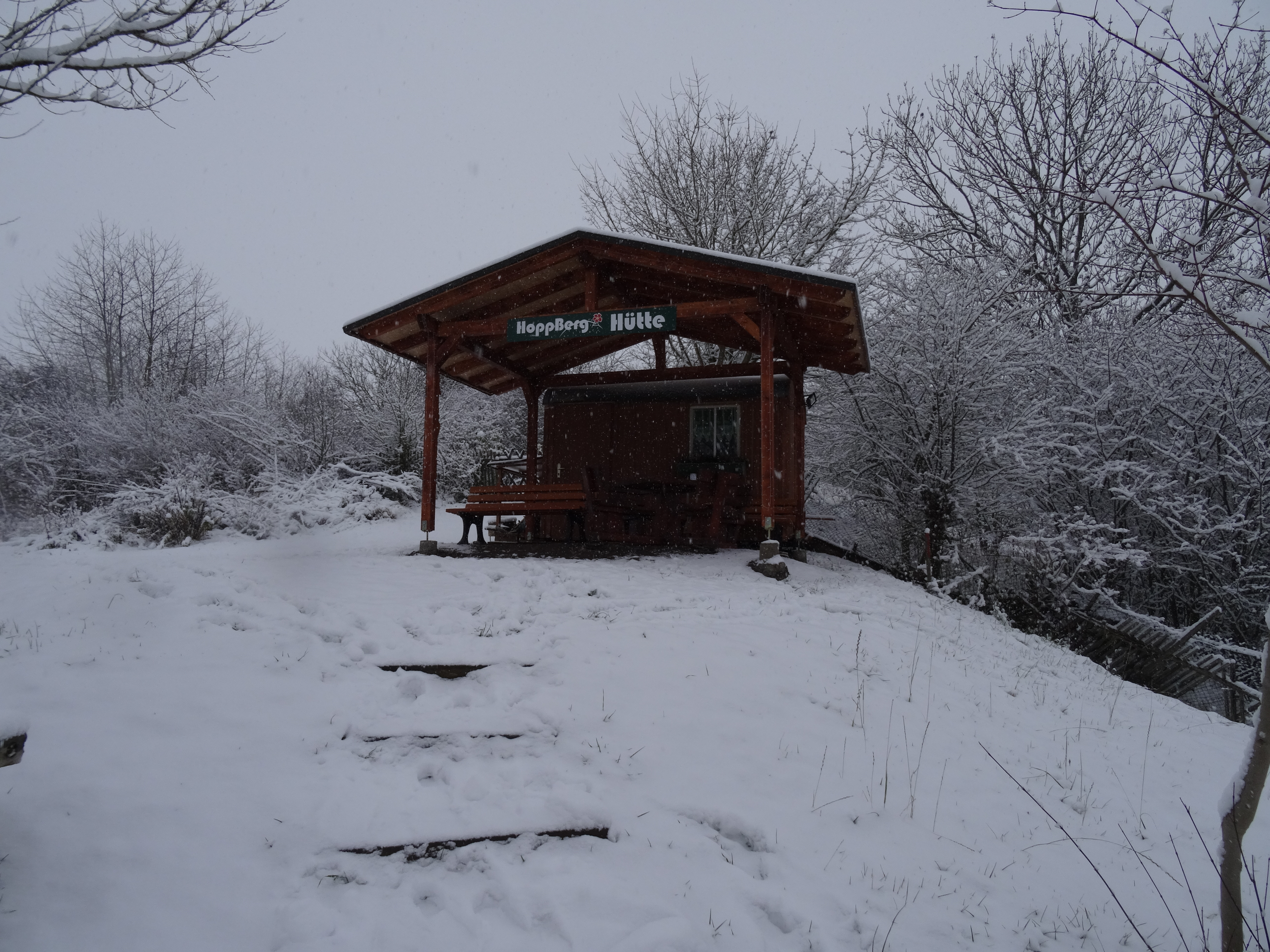 Im Jahr 2017 wurde durch Initiative von Einwohnern ein Aussichtspunkt eingerichtet, der auch als Begegnungsstätte im Ord genutzt wird.